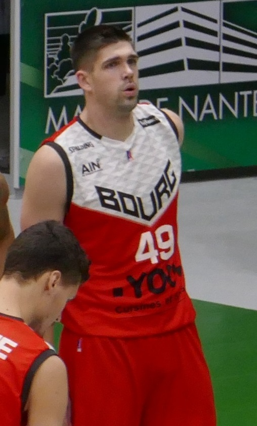 Biruta-Gilvydas